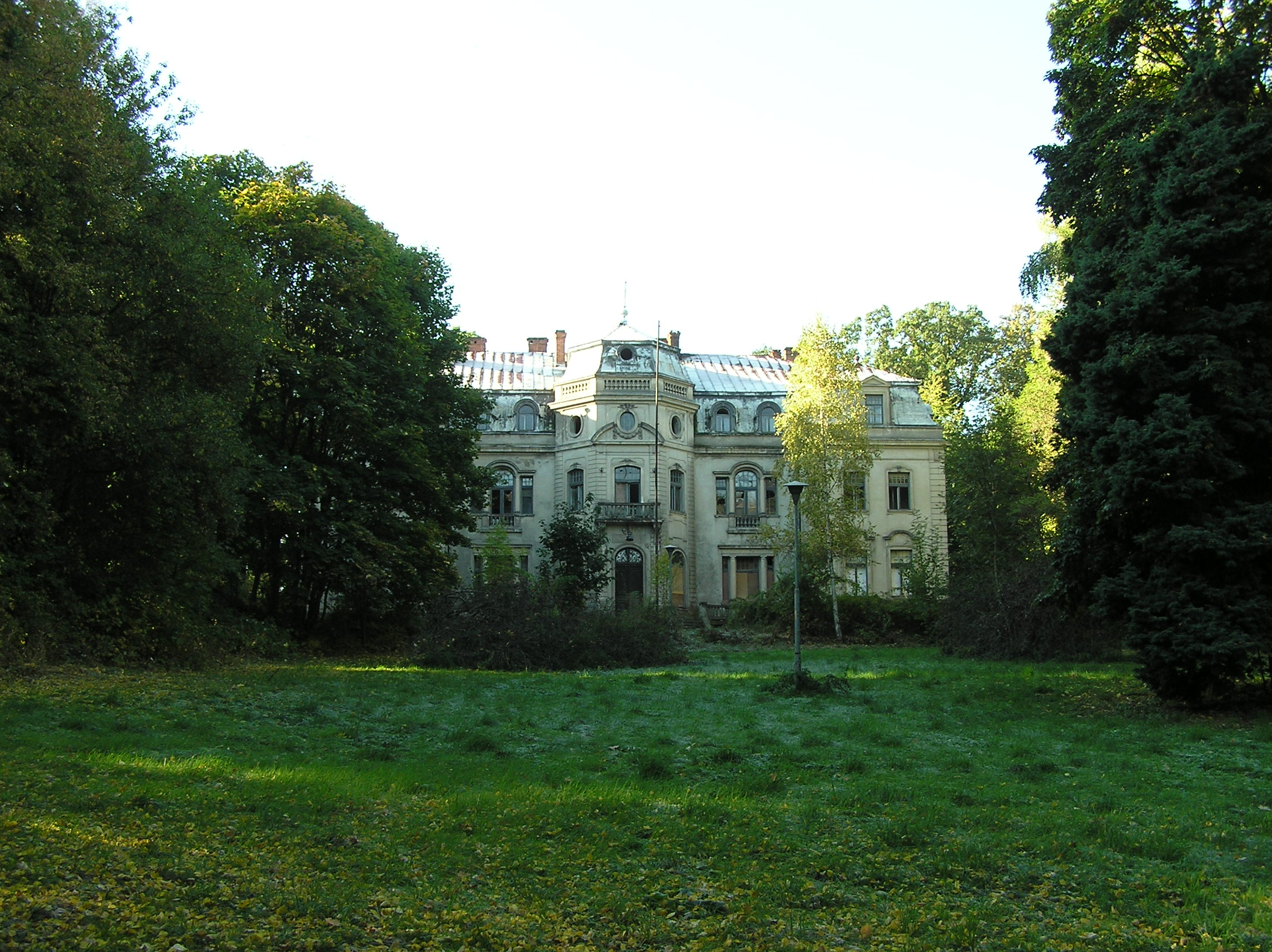 Pałac eklektyczny w Borkowicach, powiat przysuski